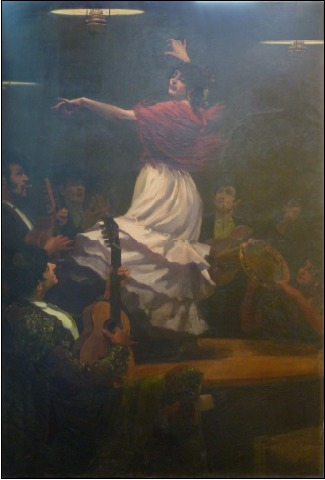 Escena de ball flamenc, en el que sembla un "cafetín" de Andalusia